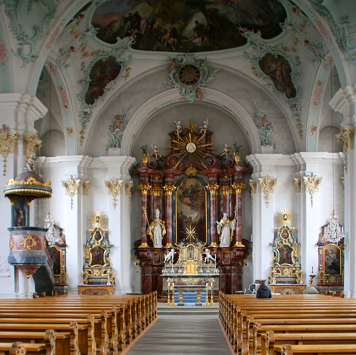 Der barocke Innenraum der katholischen Pfarrkirche St. Maria Himmelfahrt in Tiengen (Waldshut-Tiengen, Landkreis Waldhut, Baden-Württemberg). Blick nach vorne zum Hochaltar. Außerdem zu sehen die Kanzel (links) und vier Seitenaltäre. Das spannungsvolle Raumgefüge und die reiche barocke Auszierung und Ausstattung machen den Innenraum wertvoller als das eher nüchterne Äußere des Gotteshauses.